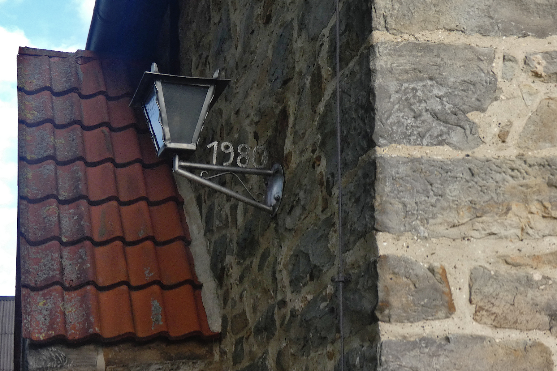 Auf dem Ausleger der Lampe bei der Südwestecke der Kapelle ist die "1980" angebracht. Möglicherweise ein Hinweis auf den Abschluss einer größeren (1978 begonnenen) Renovierung.